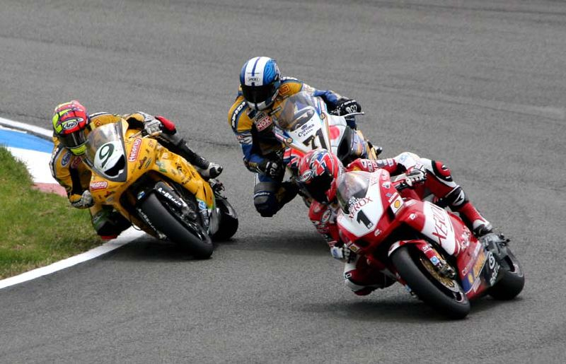 superbike